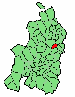 aipaturiko udalerriaren kokapena Nafarroa Beherean